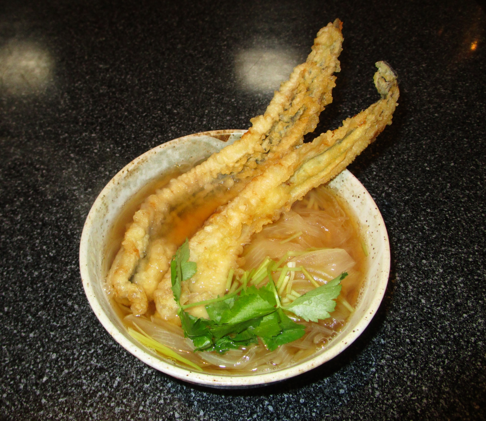 穴子天ぬーどる（兵庫県淡路市、浜ちどりより撮影）